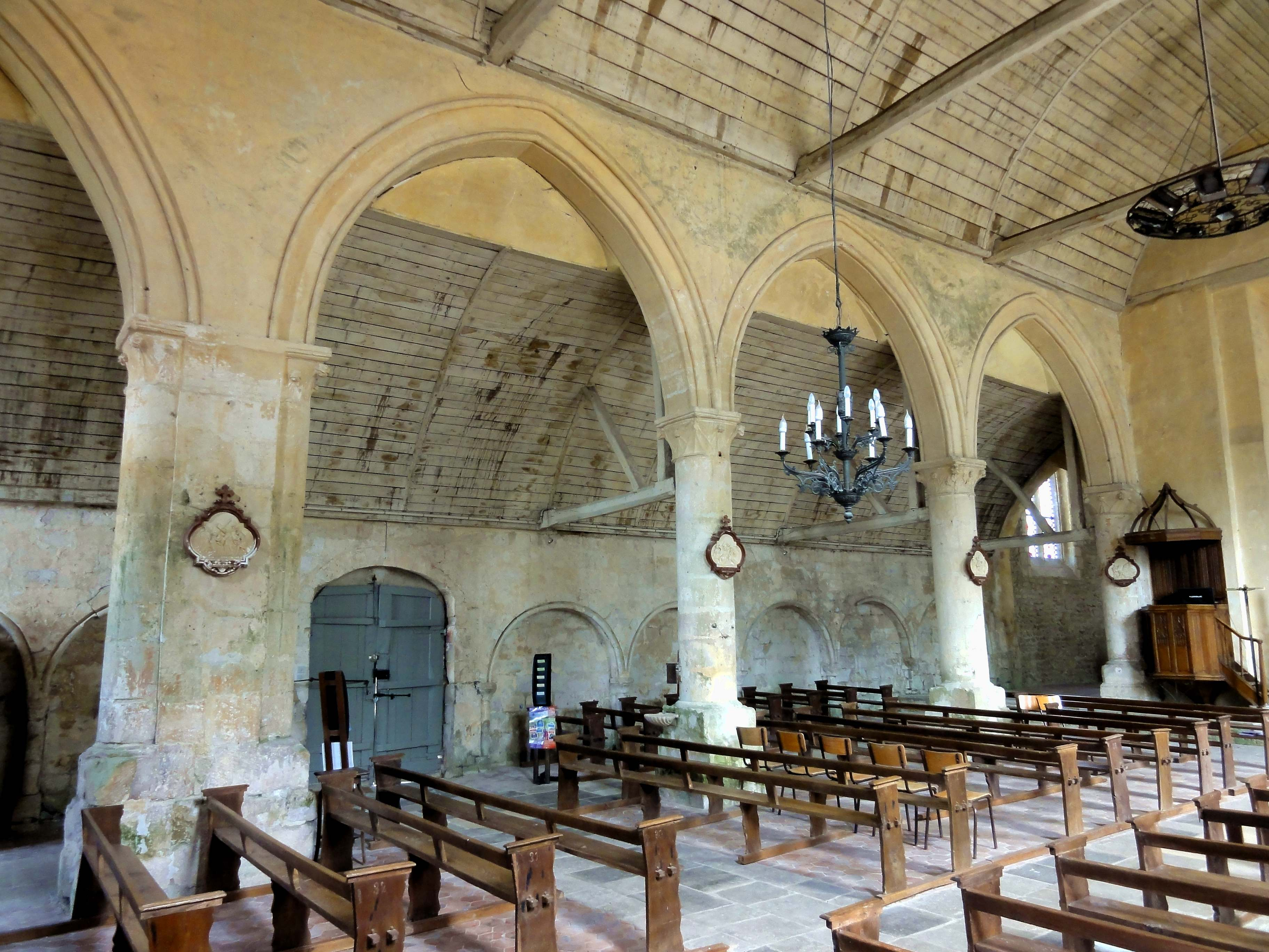 Intérieur de l'église (voir titre).